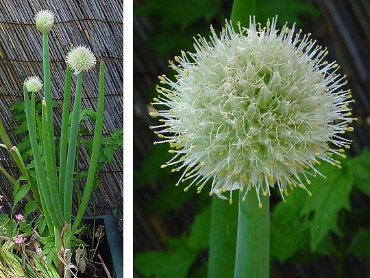 Plant en bloem van stengelui (Allium fistulosum; foto's Wouter Hagens)